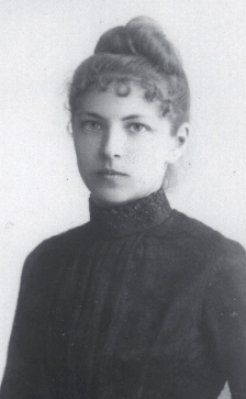 Наталья Тимофеевна Шехтель (Жегина) - жена Ф. О. Шехтеля